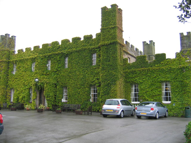 Tregenna Castle Hotel